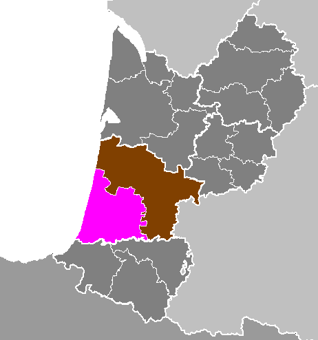 Maps of arrondissements and cantons of France: Département des Landes - Arrondissement de Dax.PNG (Région Aquitaine)